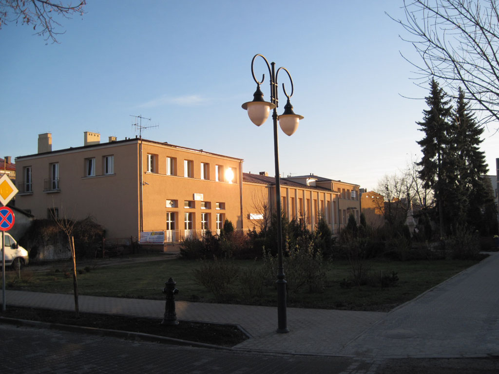 Włodawski Dom Kultury